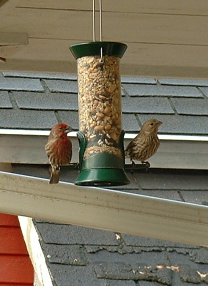 Carpodacus mexicanus